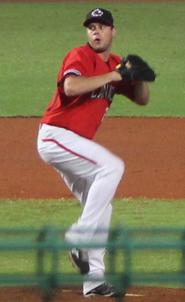 Andrew Albers